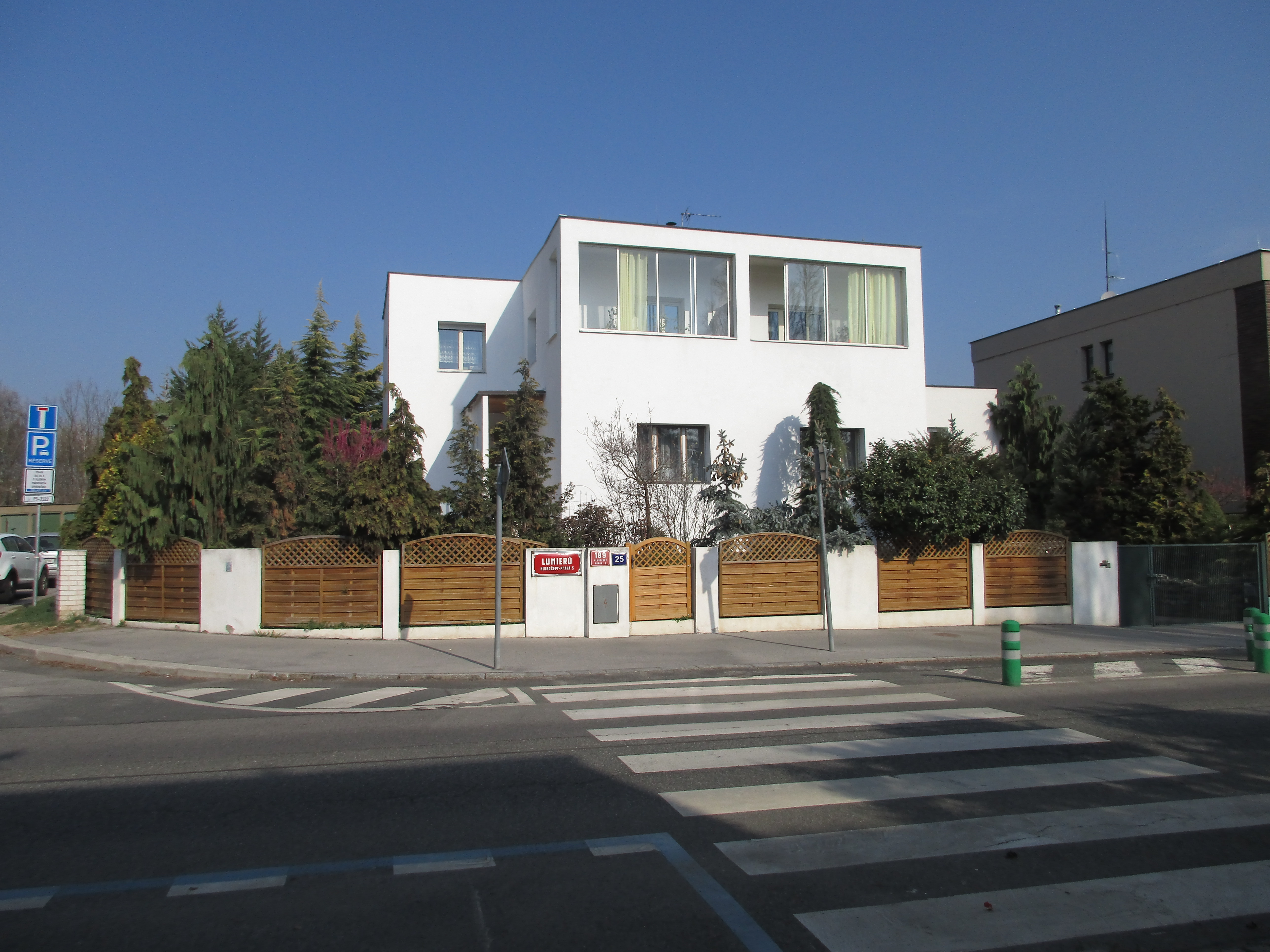 Lumiérů 189/25, Praha 5-Hlubočepy